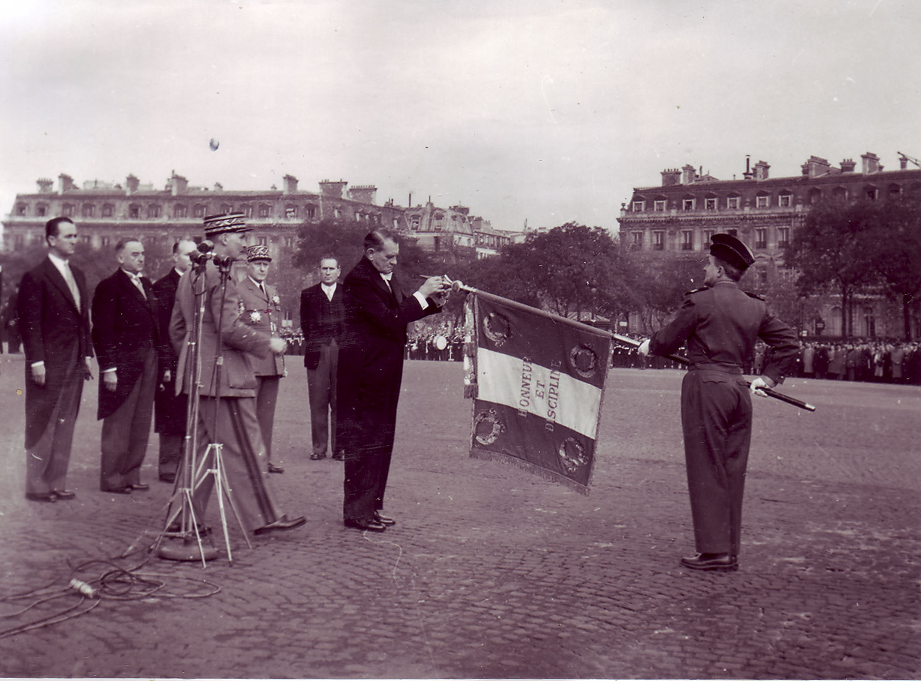 Le président René Coty remet la croix de guerre TOE au drapeau du Prytanée National Militaire (entre 1954 et 1958). Note: Está imagen fue escaneada y luego subida aquí supongo que debe estar en dominio público.